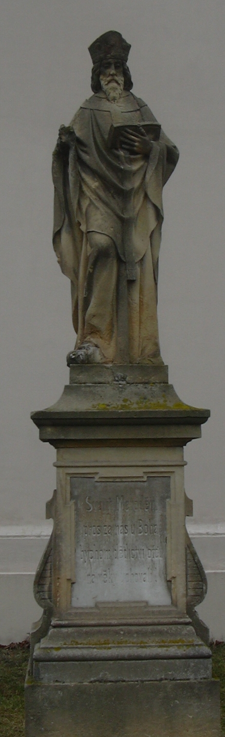 Svatý Metoděj (Vyškov (Dědice)- czech republic)